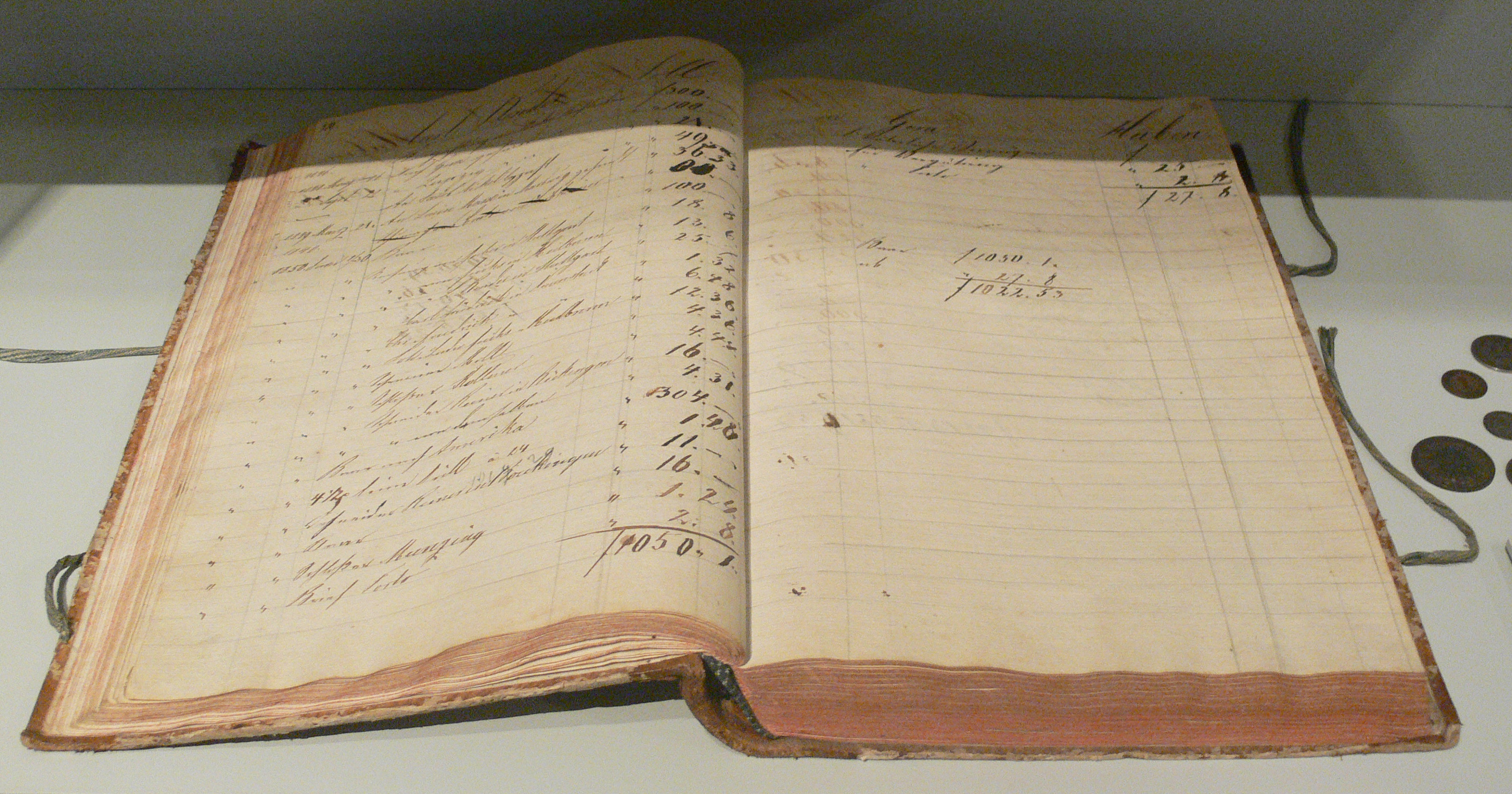 Hauptbuch der Gemischtwarenhandlung Hochstetter, vor 1828 Landesmuseum Württemberg (Außenstelle Museum für Volkskultur in Württemberg, Waldenbuch), E.6.2., Inv. Nr. L-VK 1985/814-90